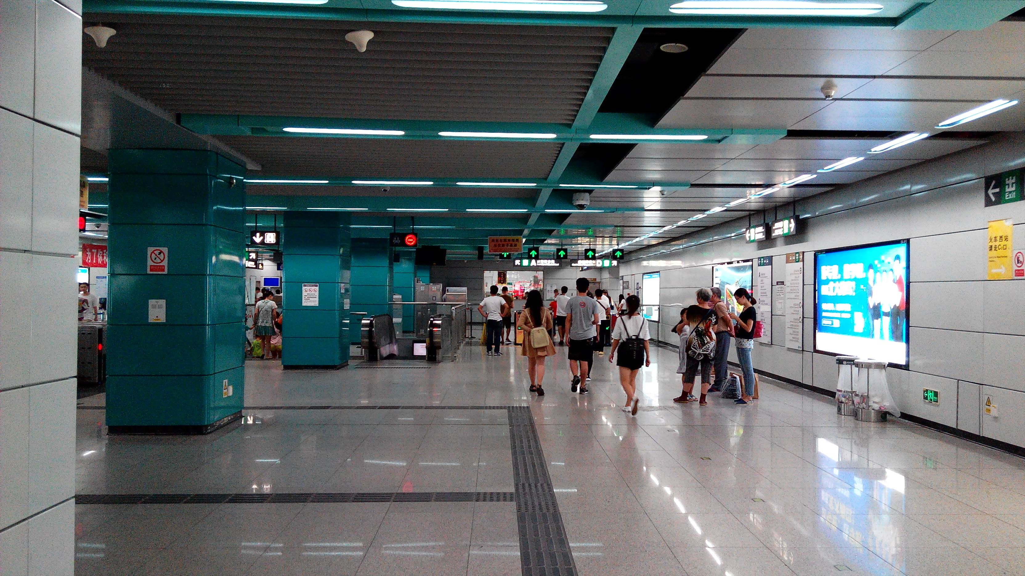 深圳地铁1号线 大新站 大堂